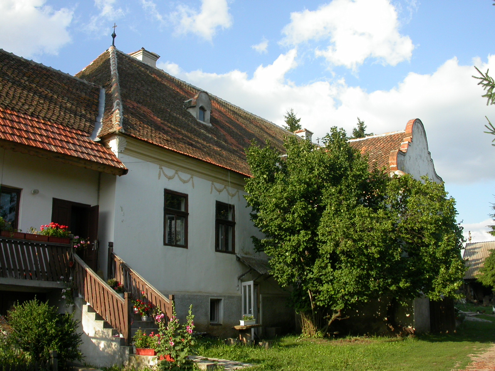 Conacul Végh, sec. XIX, transf. sec. XX